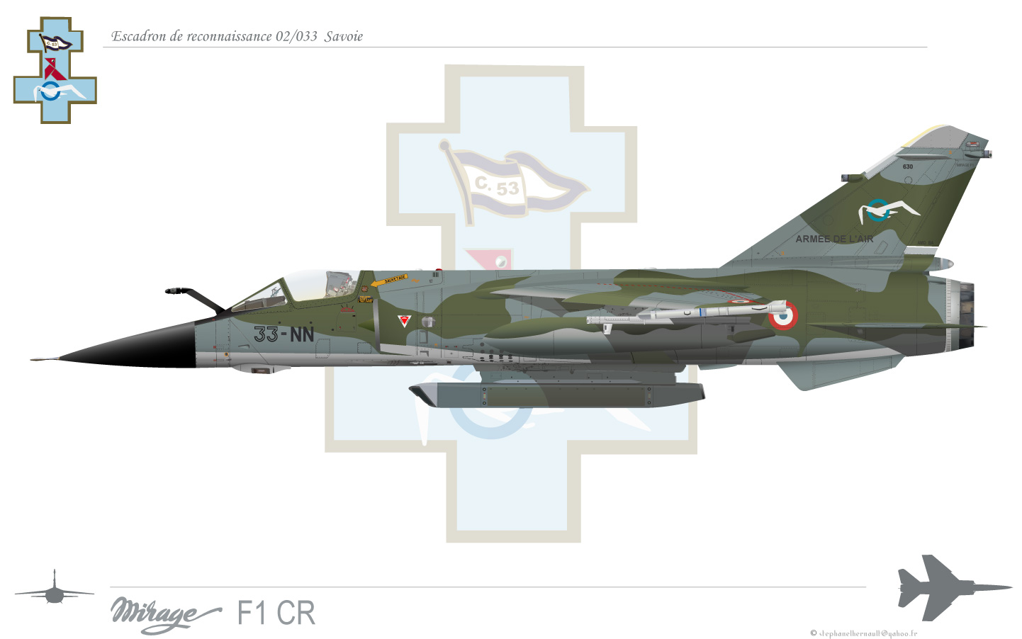 Mirage F1 CR escadron Savoie